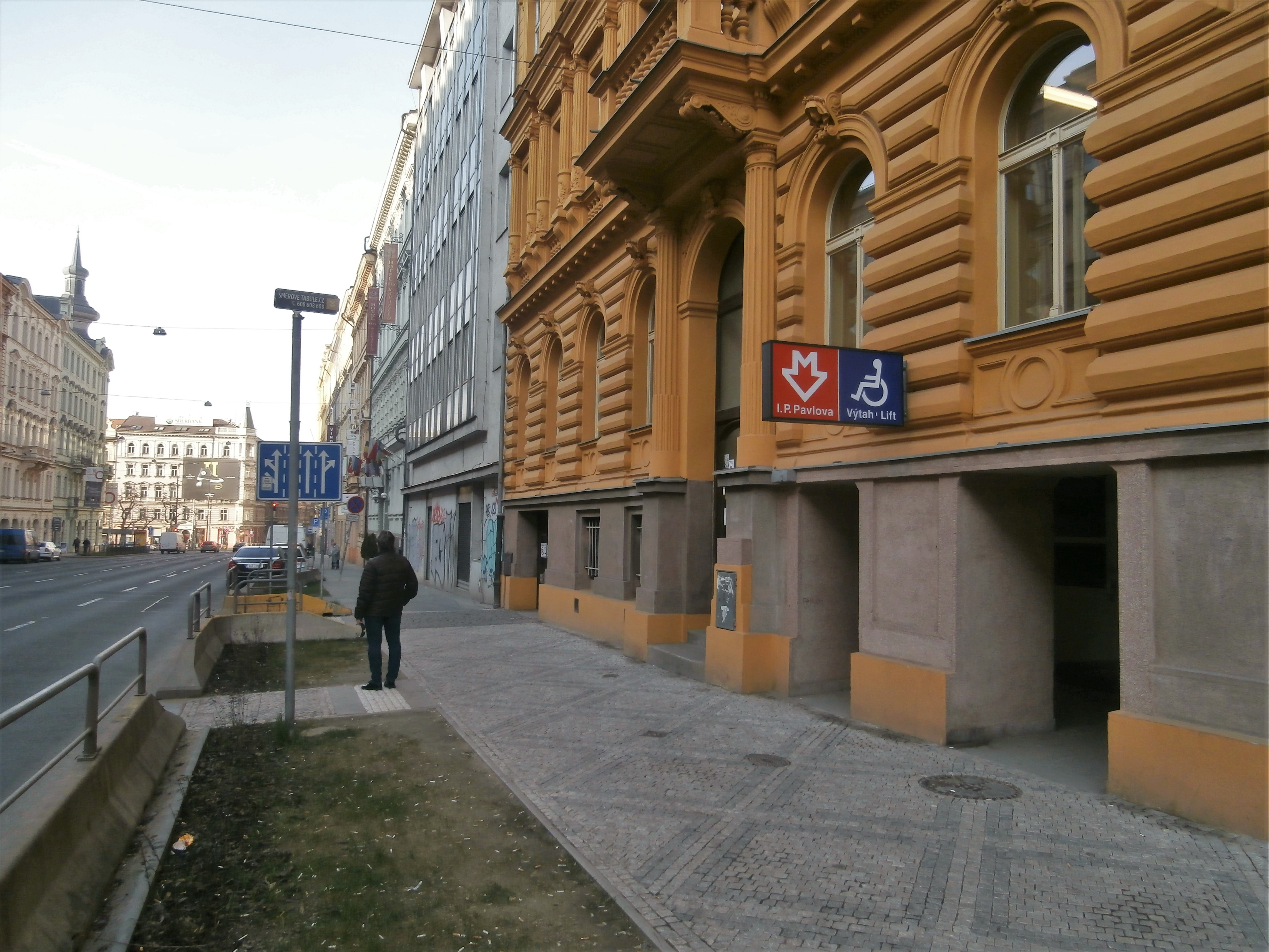 Výtah ve stanici metra I. P. Pavlova